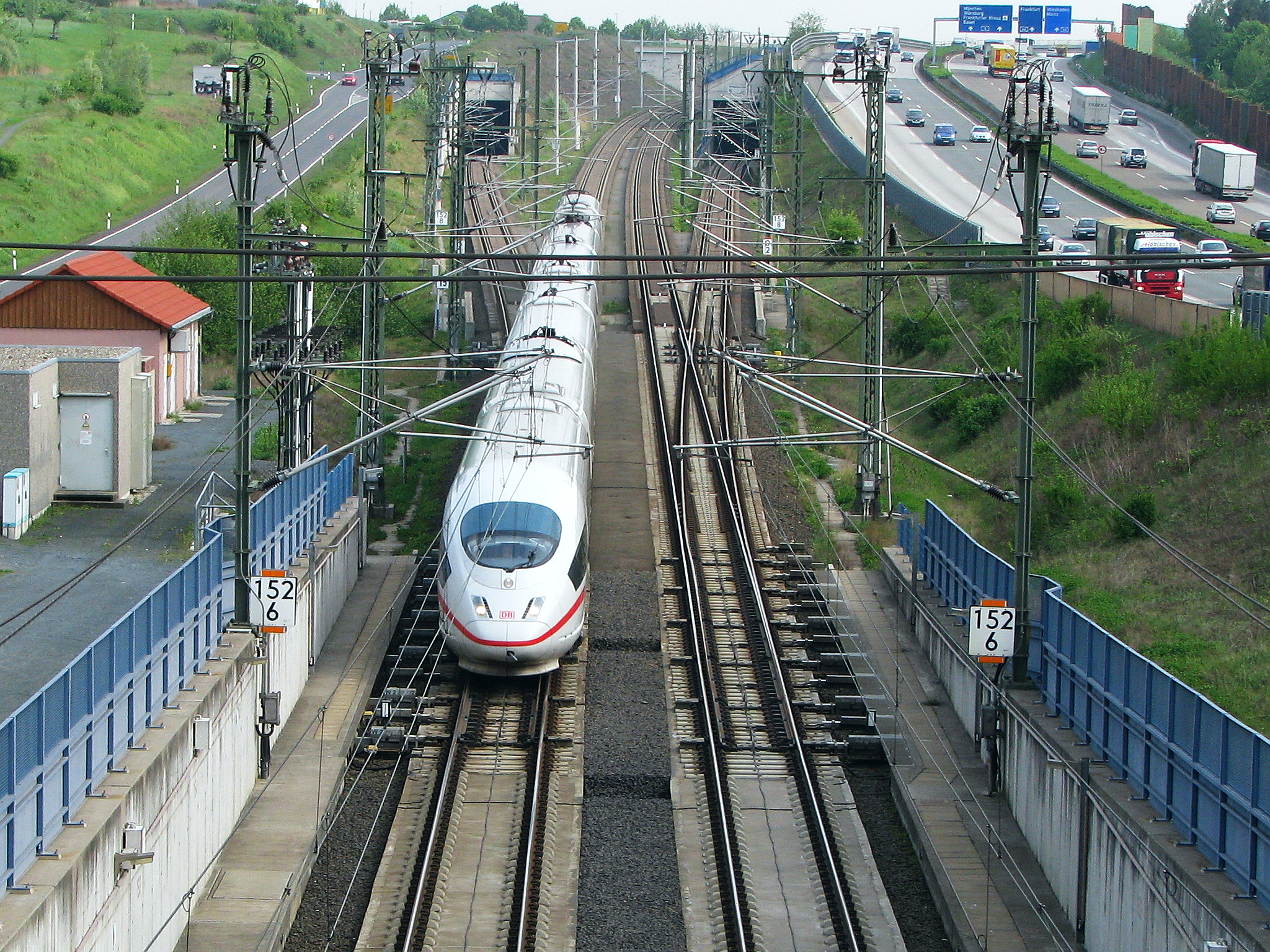 Foto a) DB Abzweig Breckenheim mit Wandersmann-Nord-Tunnel (links) und Wandersmann-Süd-Tunnel (rechts) sowie b) ein ICE bei Km 152,6 vor Einfahrt in den Tunnel Breckenheim nordwärts auf der Schnellfahrstrecke Rhein/Main-Köln. Foto Wolfgang Pehlemann IMG_5156